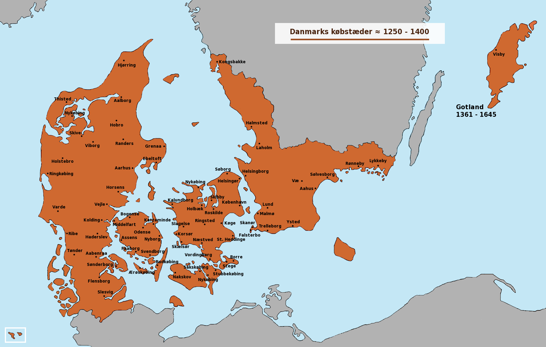 Danmarks købstæder o. 1250-1400, kilde:Gyldendal og Politikens Danmarkshistorie, bind 5, s. 47